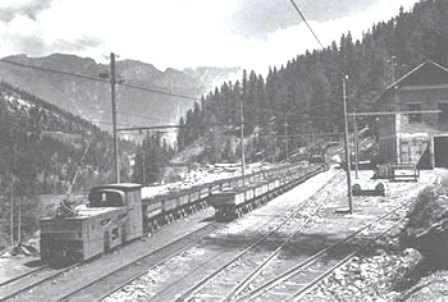 Miniera di Arpy - 1938